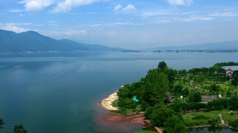 邛海青龙湾沙滩-流浪的狗狗